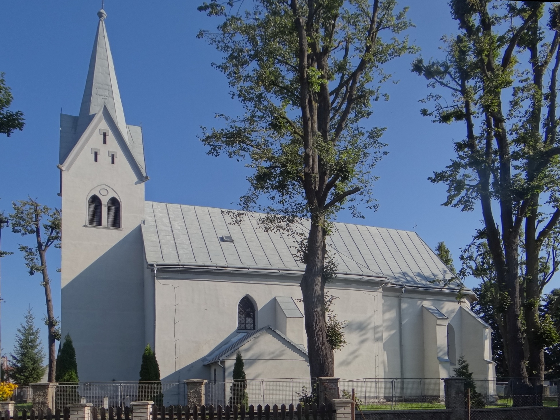 Bušovce, kostol